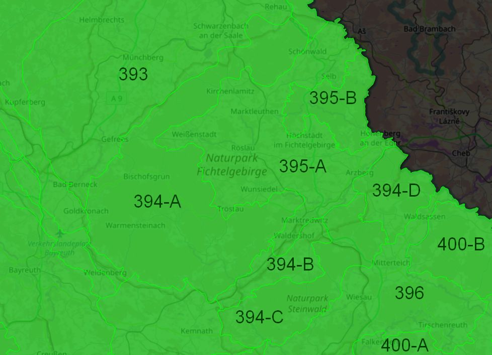 Naturraumkarte des Fichtelgebirges nebst Selb-Wunsiedeler Hochfläche nebst den angrenzenden Landschaften Naab-Wondreb-Senke (SO) Münchberger Hochfläche (NW} mit den Einheiten nach LfU Bayern: 393 Münchberger Hochfläche 394 Hohes Fichtelgebirge 394-A West- und Nordkamm des Hohen Fichtelgebirges 394-B Pilgramsreuther Sattel 394-C Steinwald 394-D Lausnitzer Randberge 395 Selb-Wunsiedeler Hochfläche 395-A Selb-Wunsiedler Hügelland 395-B Selber Forst 396 Naab-Wondreb-Senke 400 Hinterer Oberpfälzer Wald 400-A Hinterer Oberpfälzer Wald im engeren Sinne 400-B Waldsassener Schiefergebirge